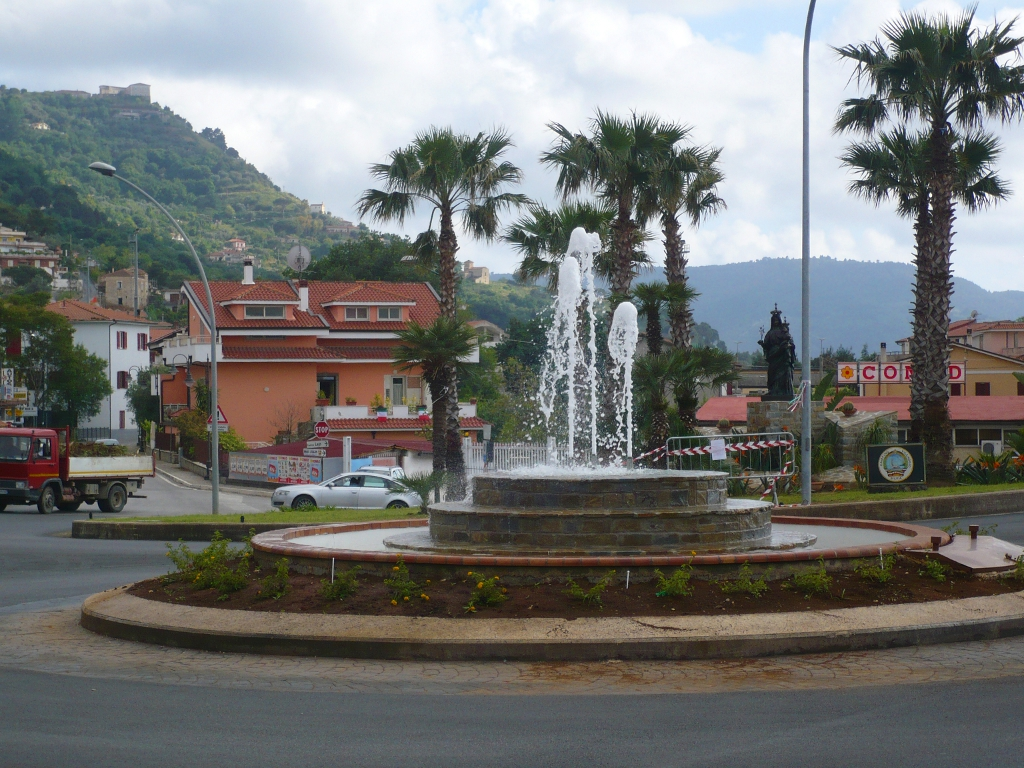 La rotatoria dell'ingresso nord di Santa Maria di Castellabate (bivio Sant'Andrea) sulla strada regionale 267 del Cilento